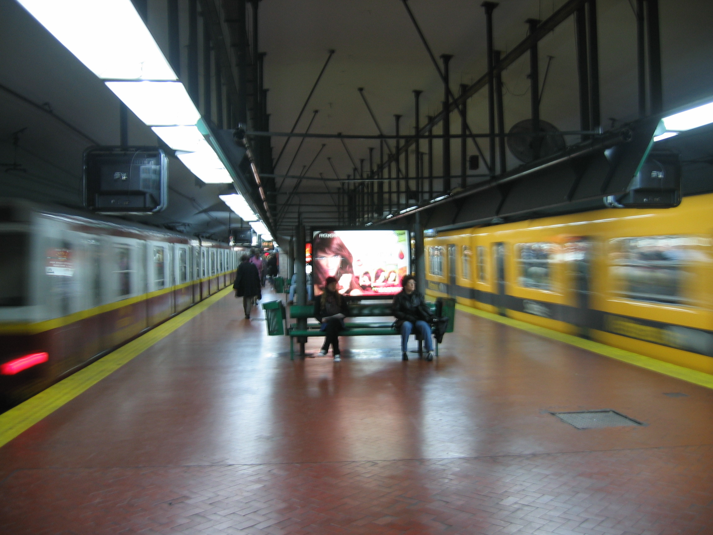 Dos formaciones pasando por la estación Pueyrredón de la línea D del subterráneo porteño, una Materfer argentina a la izquierda y una Nagoya japonesa a la derecha.SUBTE